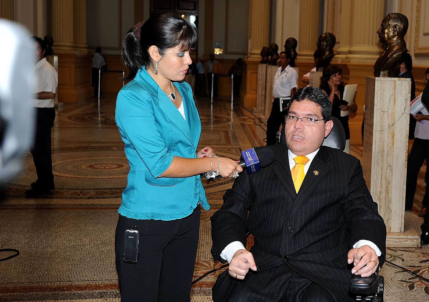 El tercer vicepresidente del Congreso, Michael Urtecho Medina, formula declaraciones al periodismo en el Hall de los Pasos Perdidos del Palacio Legislativo.